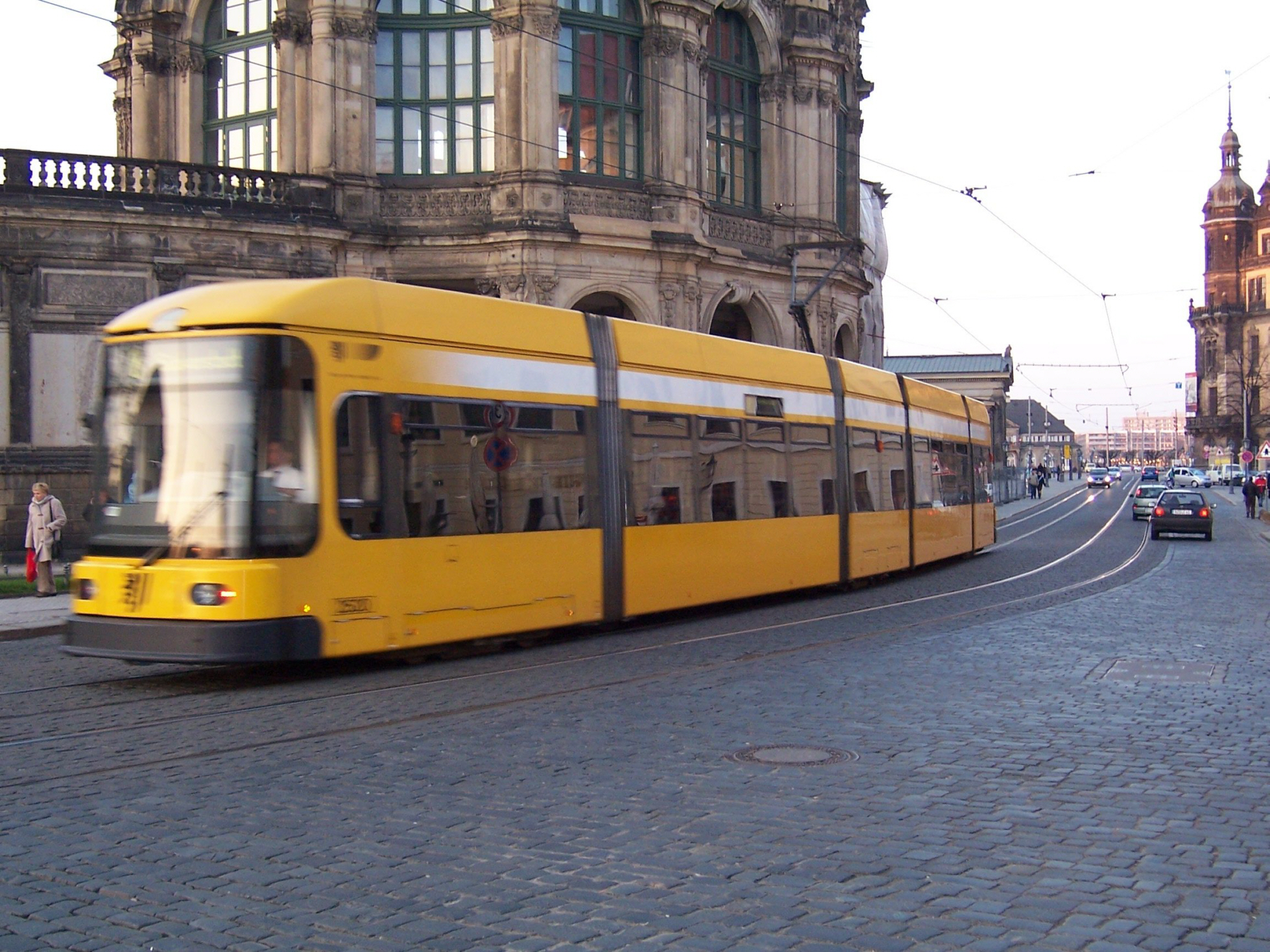 Straßenbahnwagen NGT6DD der Dresdner Verkehrsbetriebe AG vorm Dresdner Zwinger.